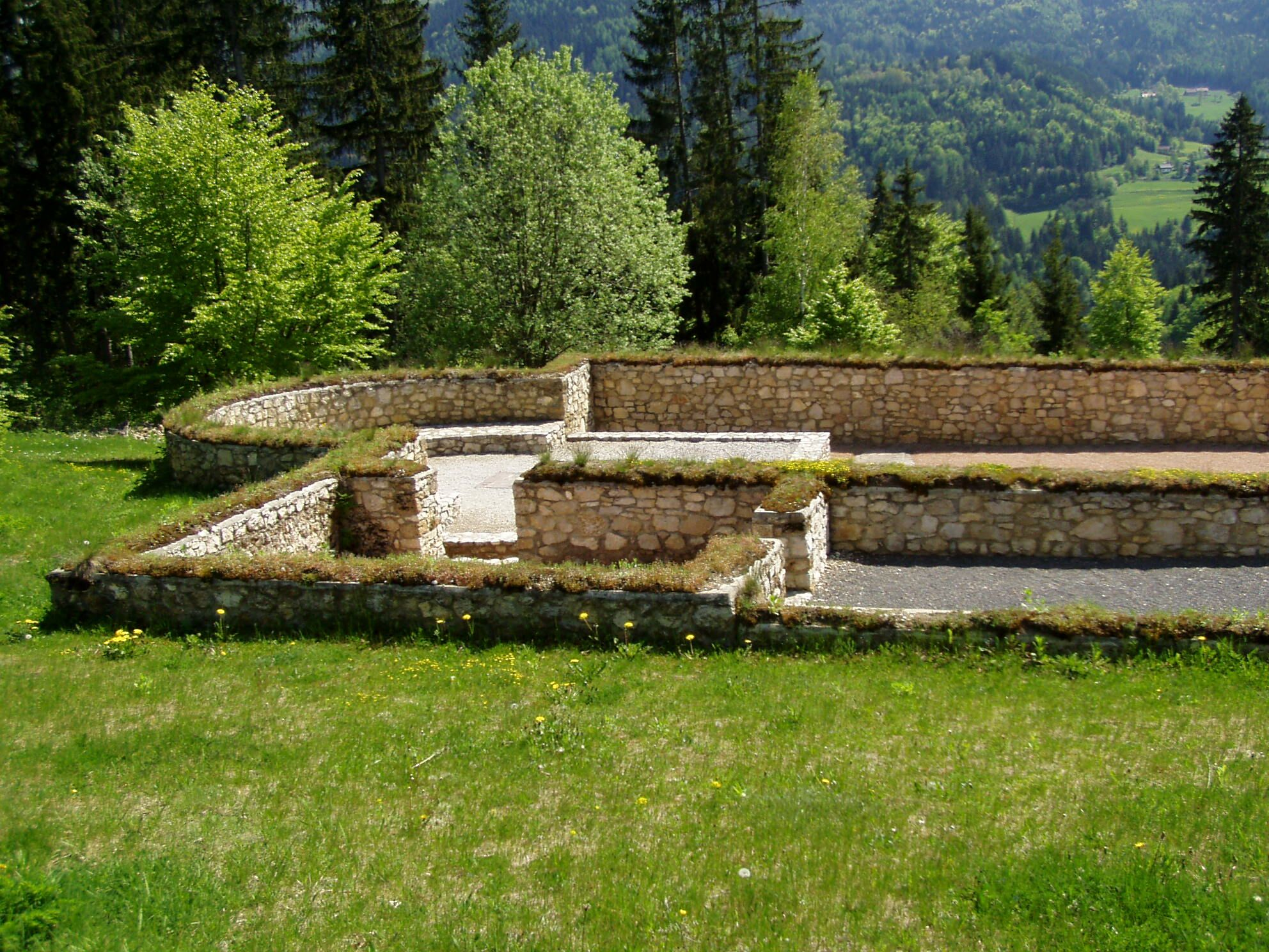 Hemmaberg, Carinthia. Westliche Doppelkirche, südliche Gemeinde- und Märtyrerkirche. Vorne Sakristei, hinten Presbyterium